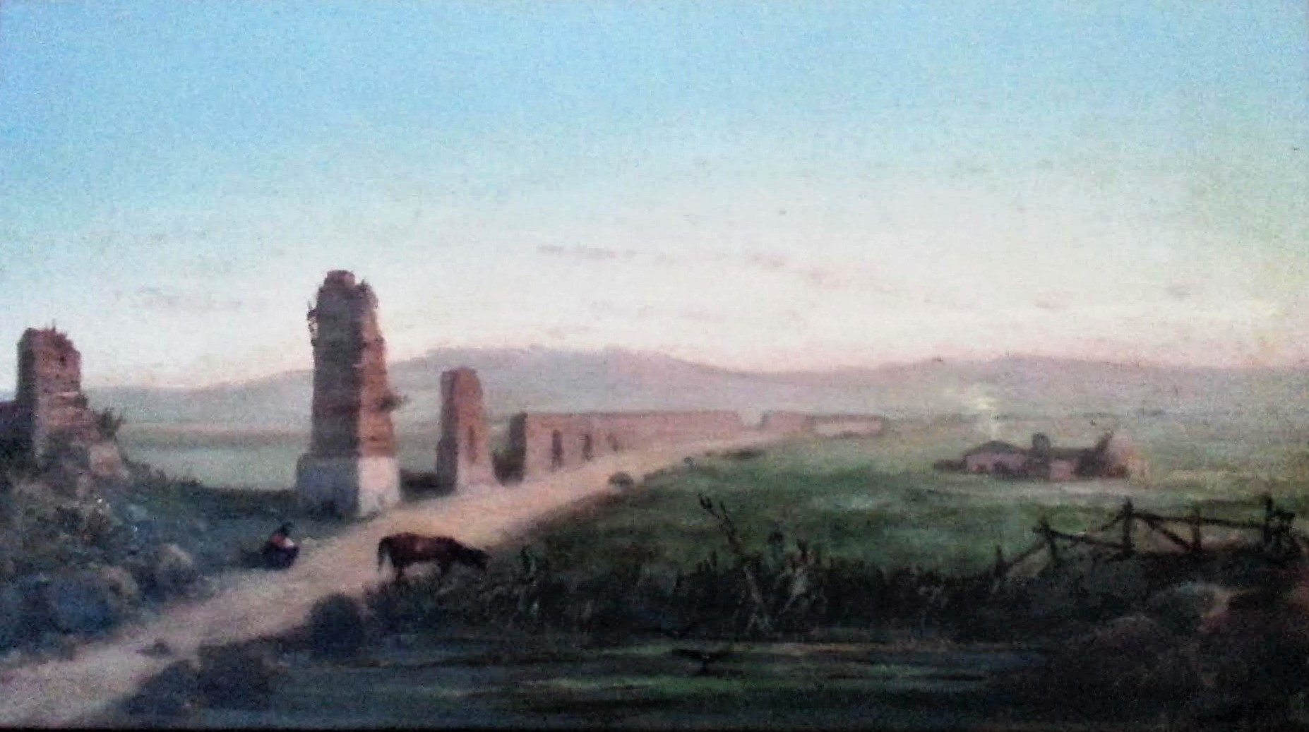 Campagna Olio su tela firmato in basso a destra E.Papa